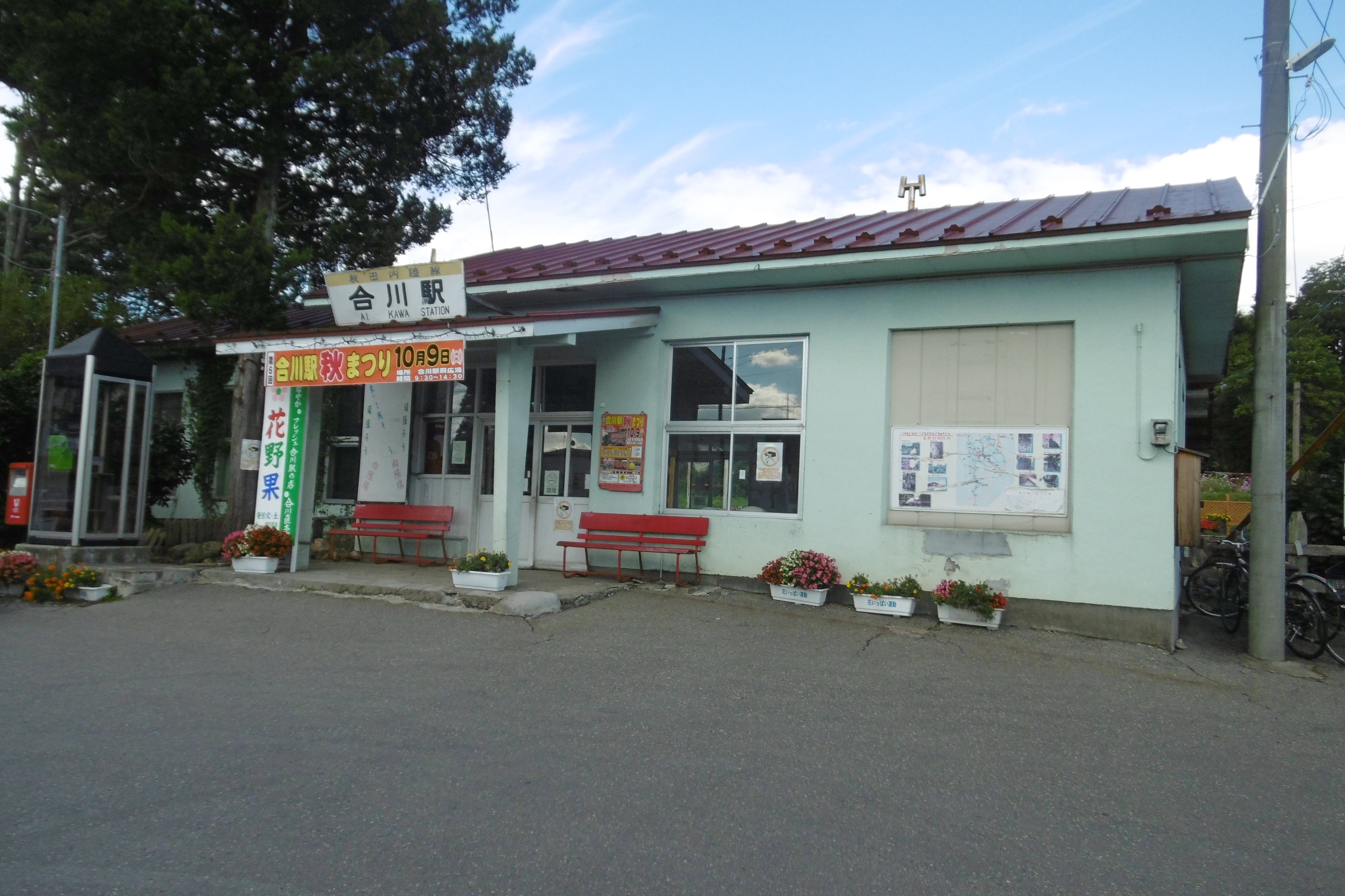 秋田内陸線・合川駅